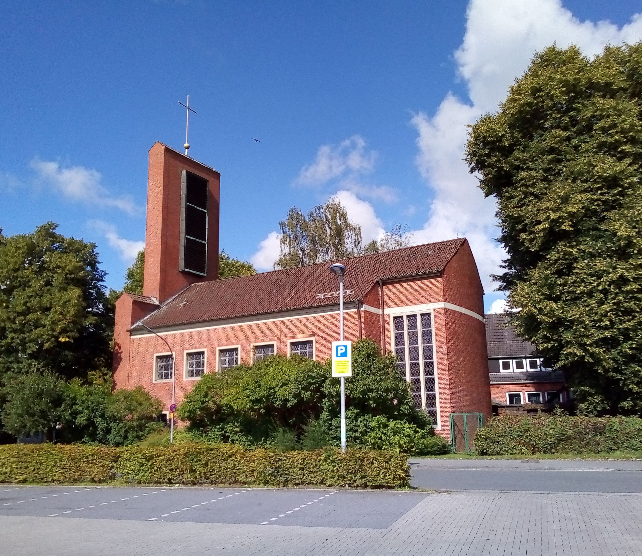 Apostelkirche in Wilhelmshaven-Altengroden